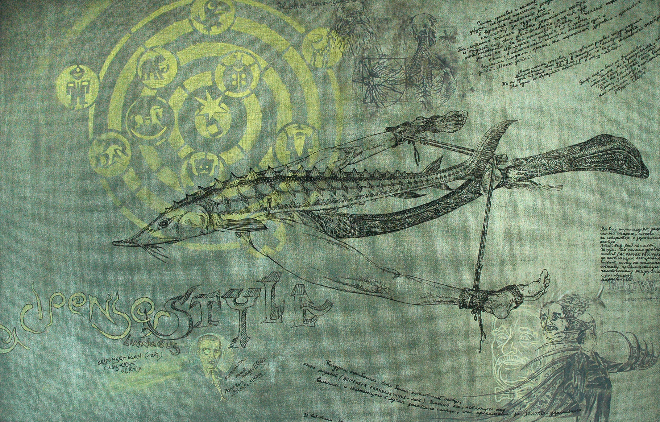 ACIPENSER STYLE. Холст, масло, 140Х90 см. 2012 г